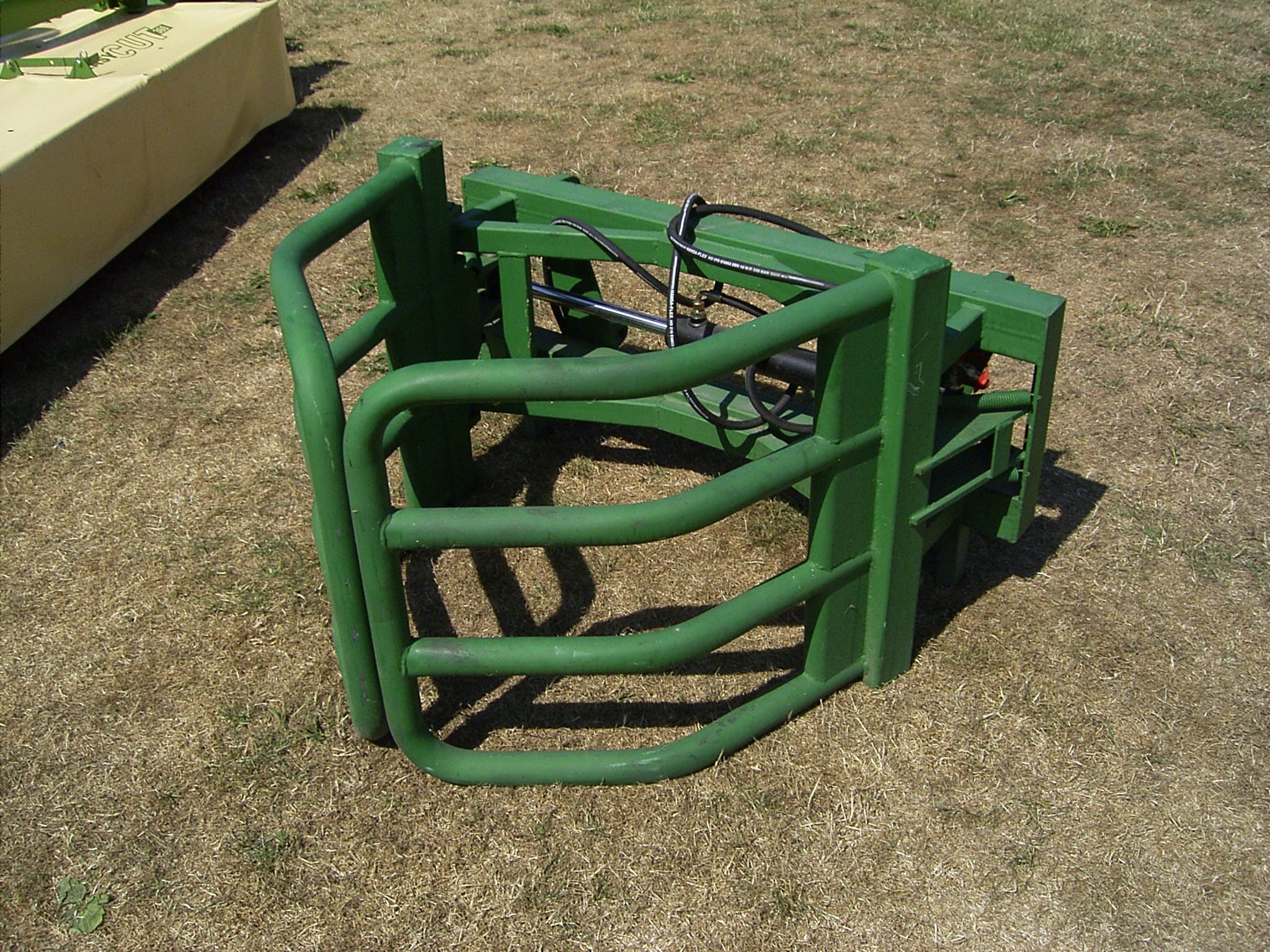 Ballengreifer, Greifzange für die Montage an einem Frontlader zum Heben von Rundballen